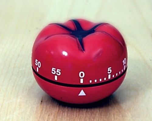 Chiếc đồng hồ quả cà chua Pomodoro của Francesco Cirillo